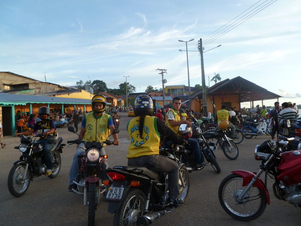 Moto taxi : Transport courant à Tabatinga et Leticia